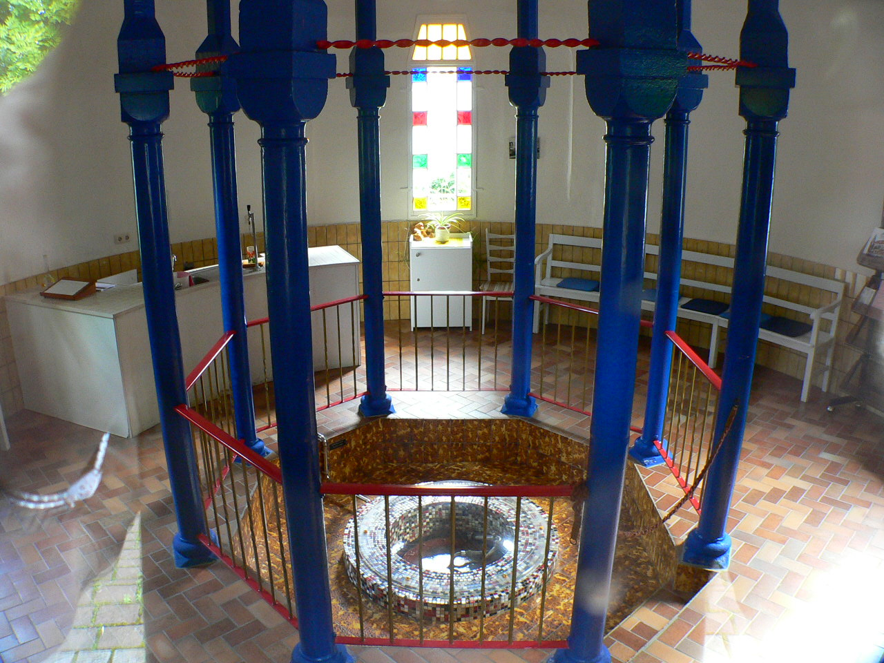 Löwensprudel Bad Zwesten, Hessen; Innenraum des Brunnentempels